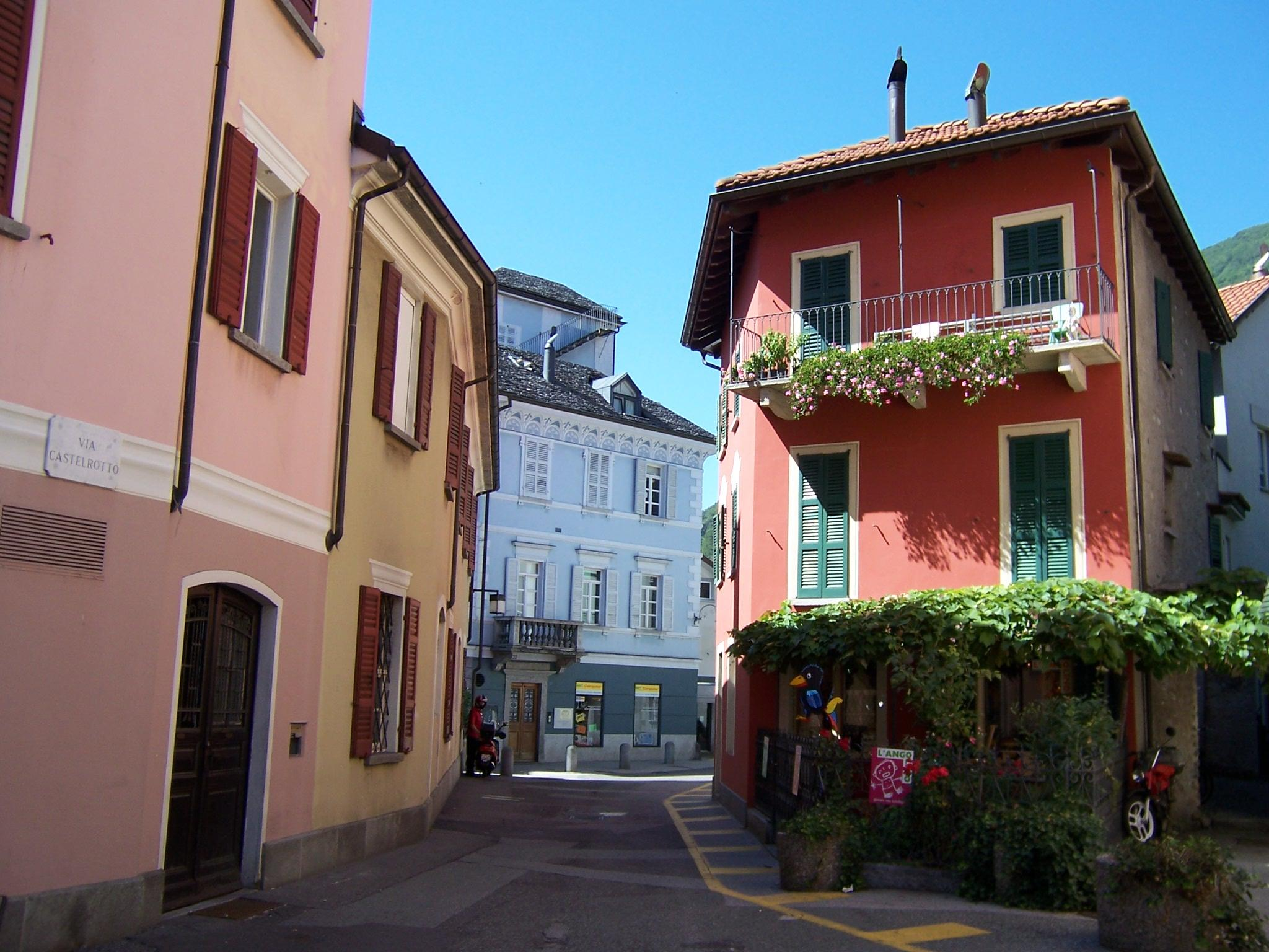 Altstadt von Locarno (Kanton Tessin / Ticino, Schweiz) eigene Aufnahme vom 5. September 2006